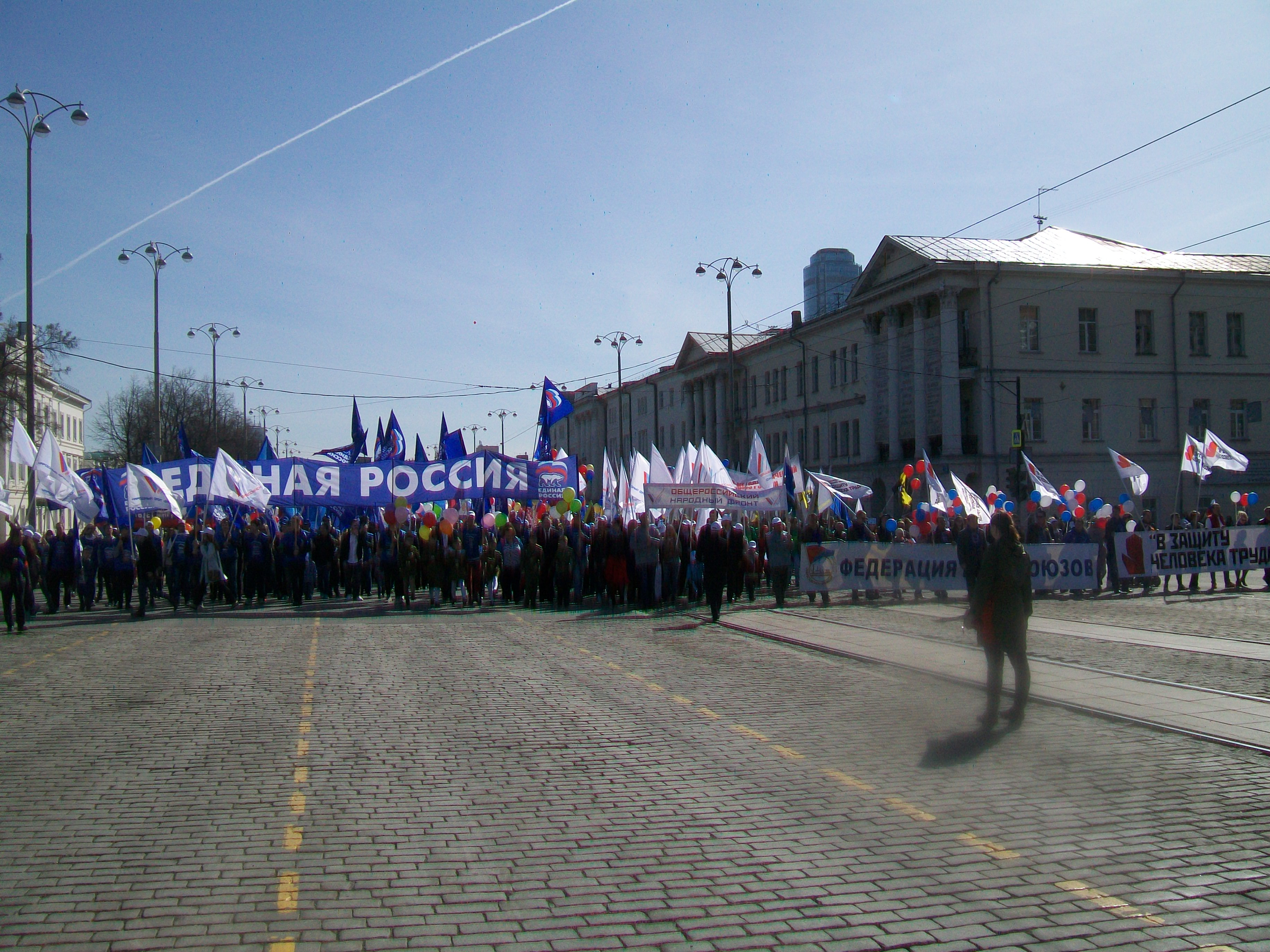 Профсоюзная колонна в Екатеринбурге, 1 мая 2017 года